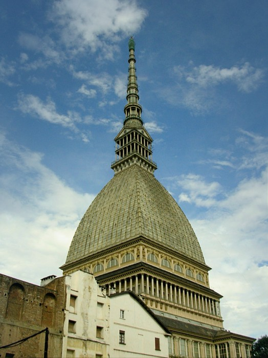 De Mole Antonelliana in Turijn